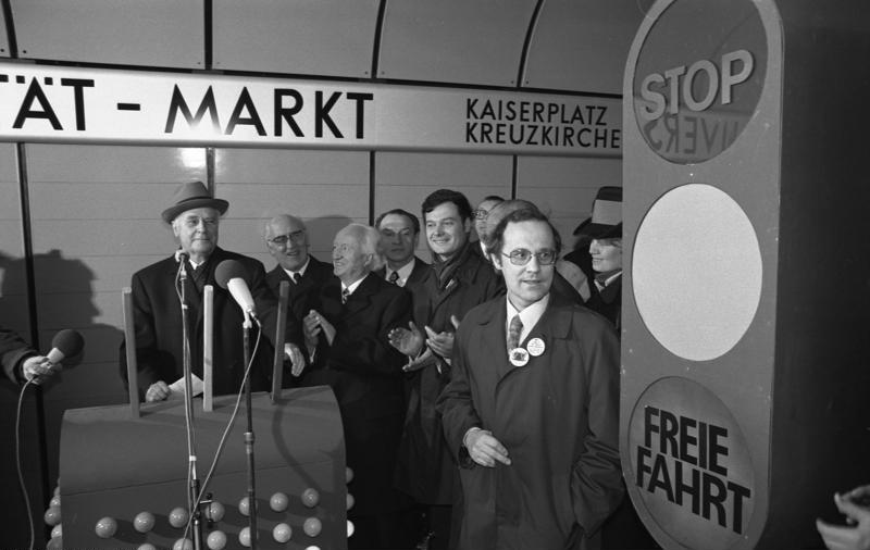 Staatssekretär Heinz Ruhnau und Oberbürgermeister der Stadt Bonn, Peter Kraemer eröffnen die erste Teilstrecke der Bonner Stadtbahn auf dem unterirdischen Haltepunkt Universität/Markt